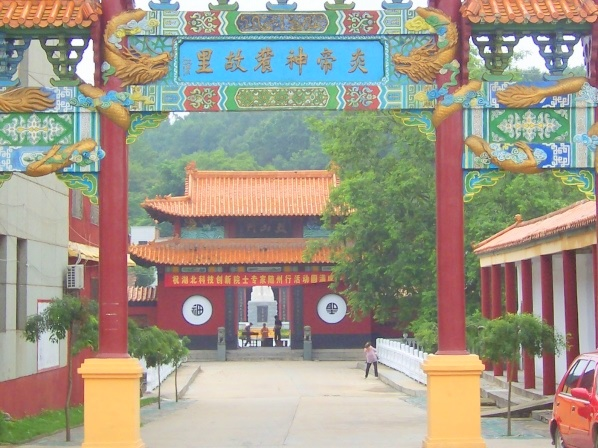 中文（中国大陆）: 炎帝故里湖北随州